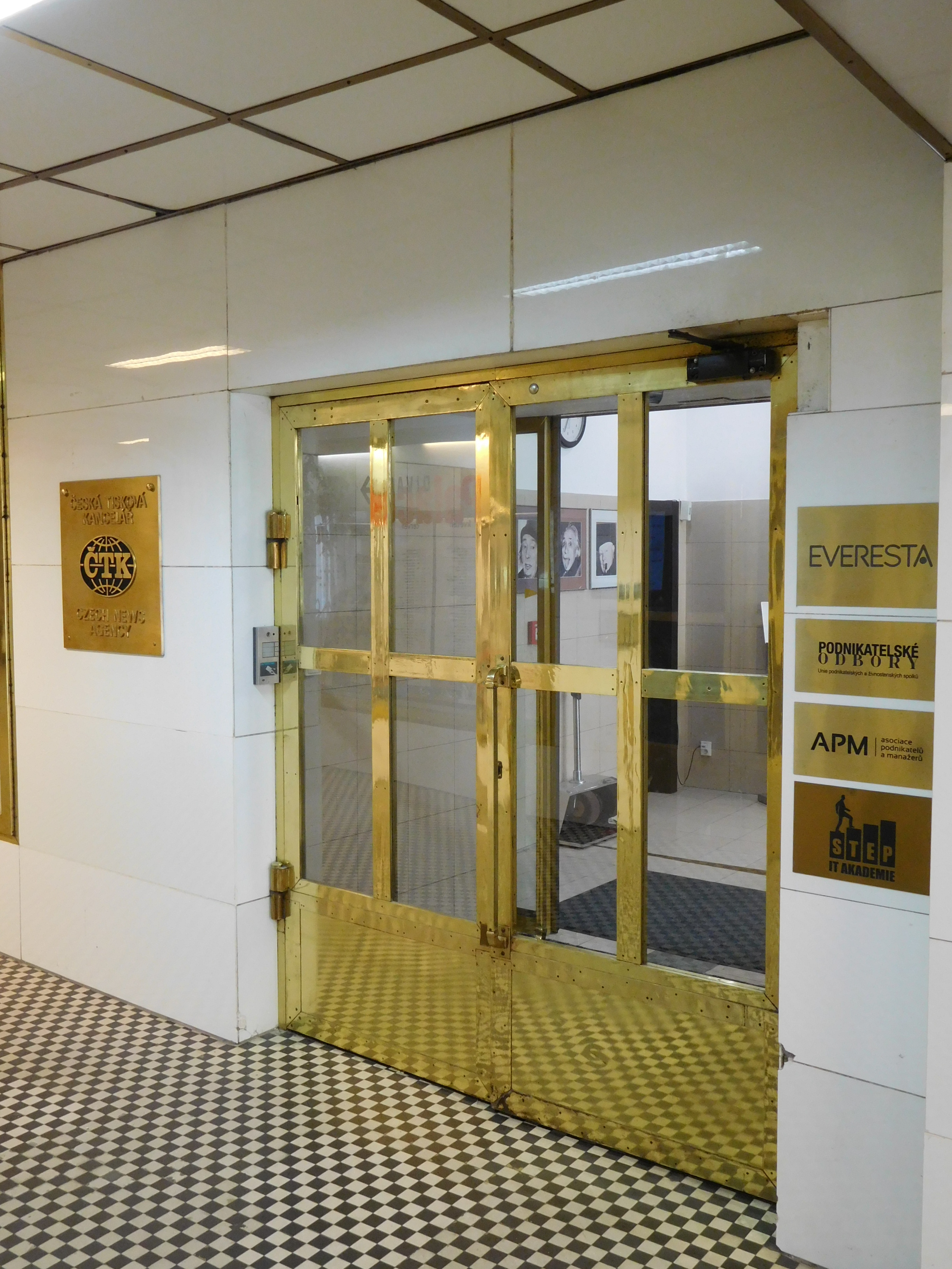 Praha - Nové Město, Opletalova 5 - ČTK